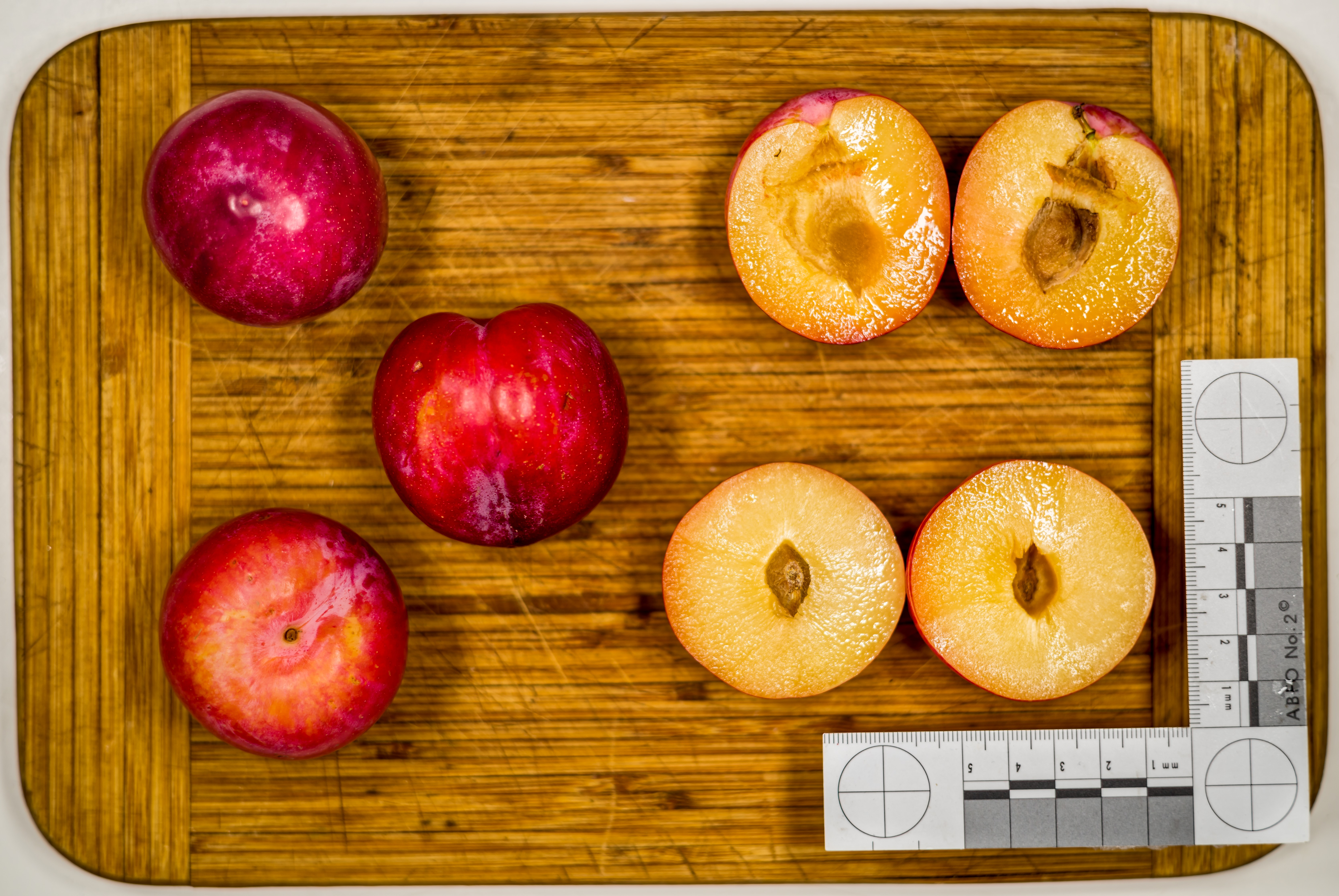 Pflaumen